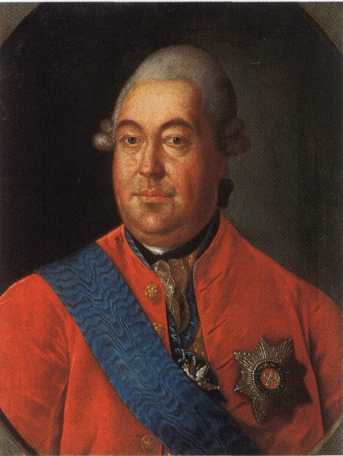 Воронцов Роман Илларионович (1717 - 1783), младший брат канцлера М.И. Воронцова. С 1755 генерал-поручик; с 1760 граф Священной Римской империи; генерал-аншеф (1761); сенатор; наместник Владимирский, Пензенский и Тамбовский.